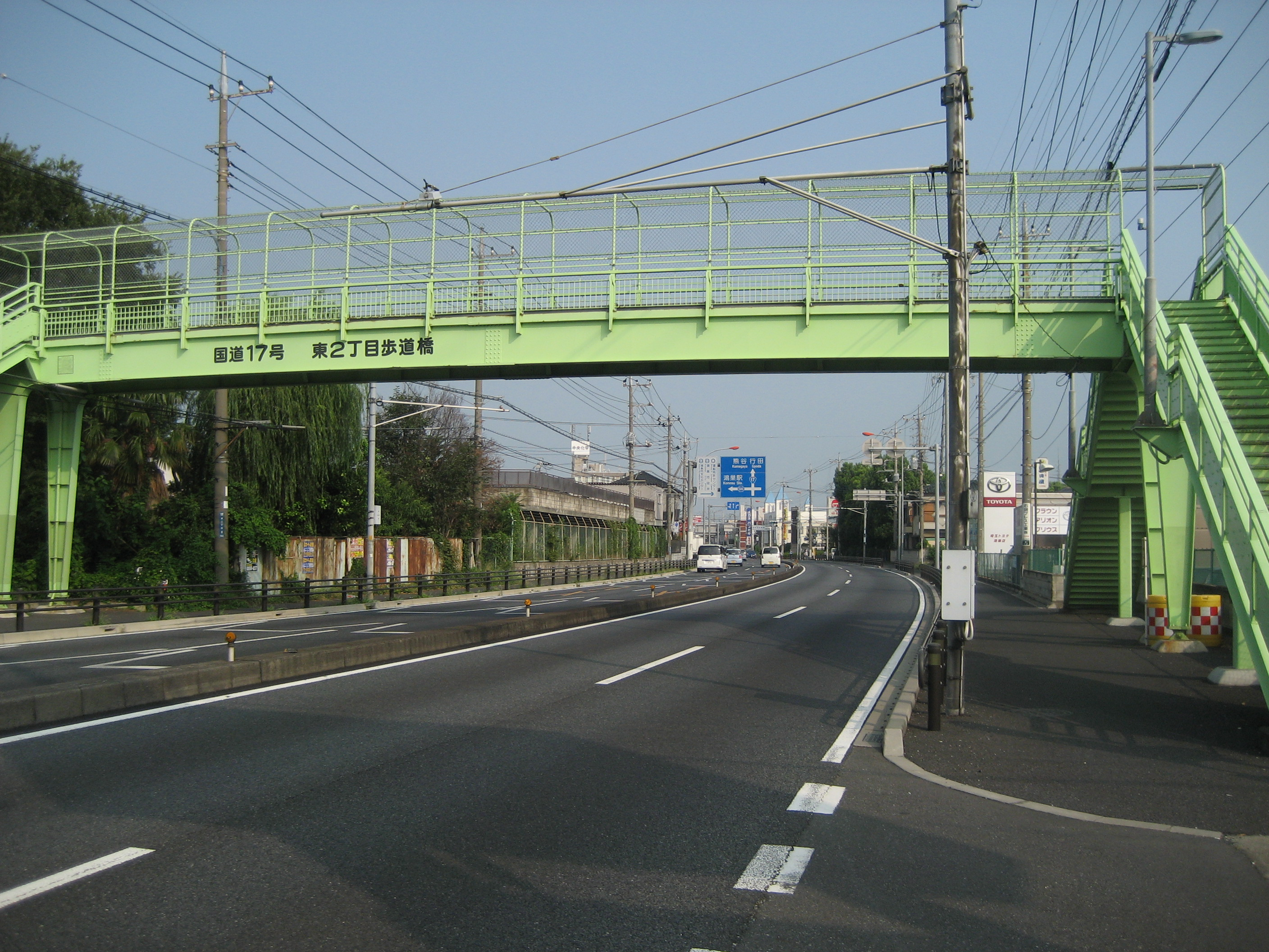 国道17号線埼玉県鴻巣市東2丁目付近（熊谷方面を撮影）